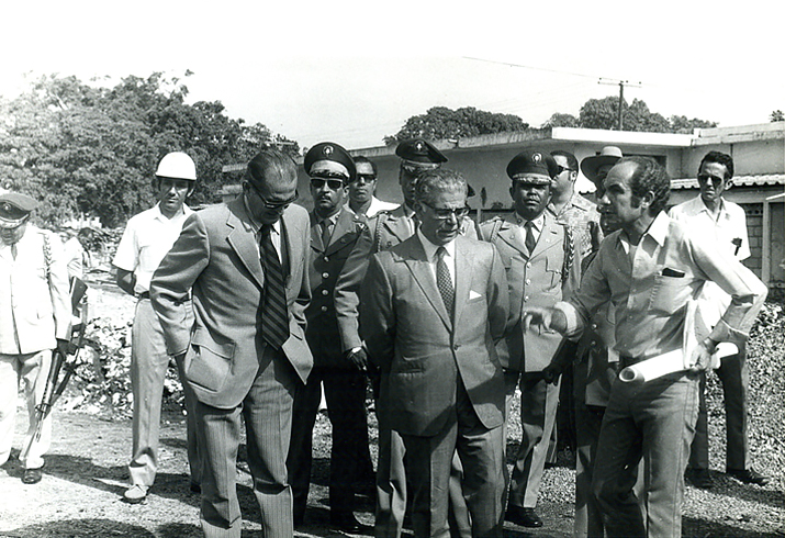 Momentos en que el Presidente Balaguer inspecciona el terreno junto al arquitecto Carbonell y otros ingenieros a cargo de la obra